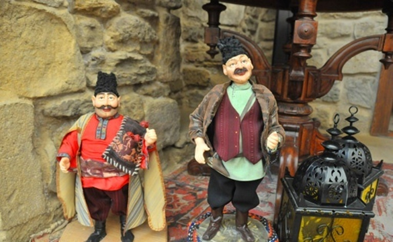 oyma